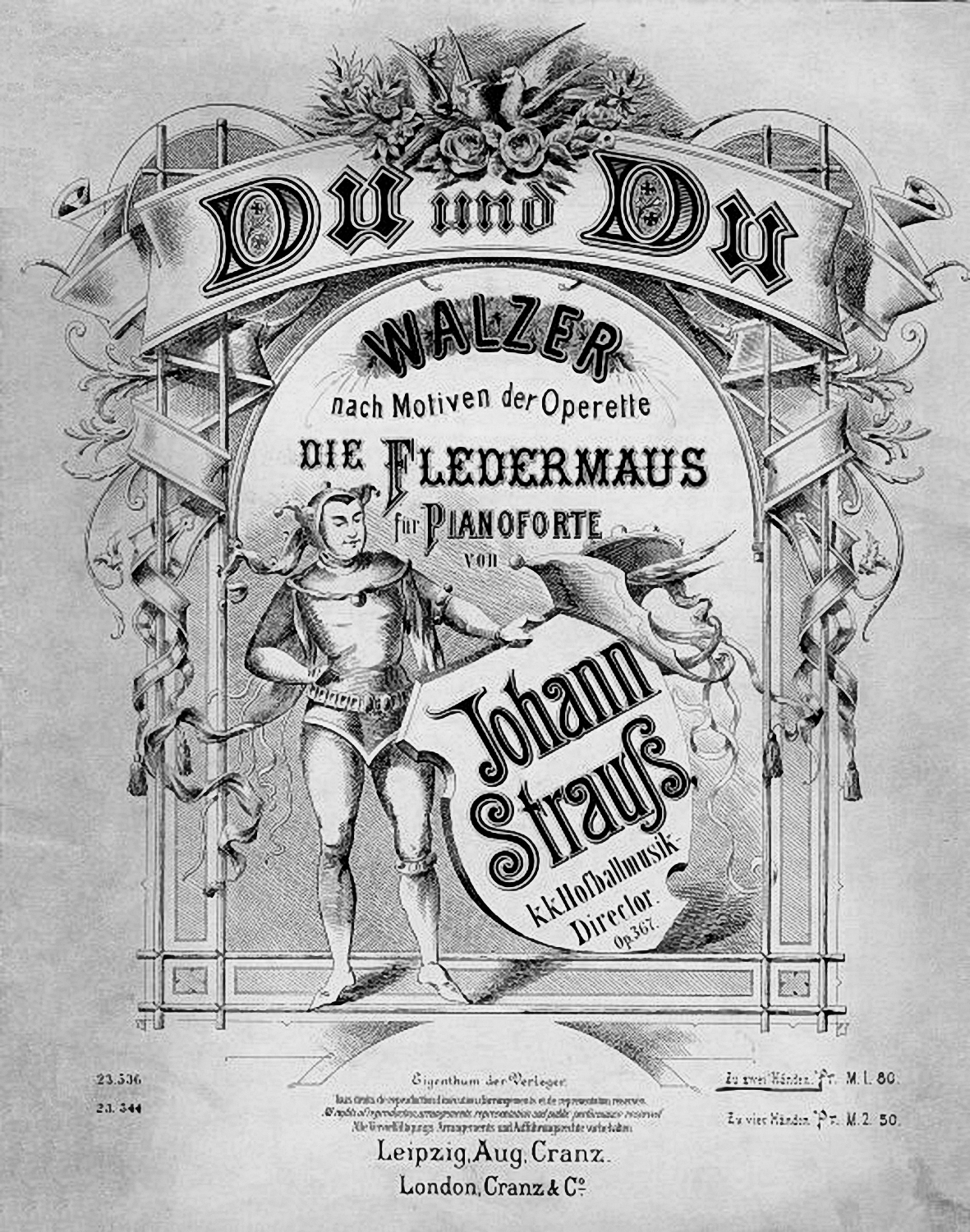 == Licenza d'uso: ==